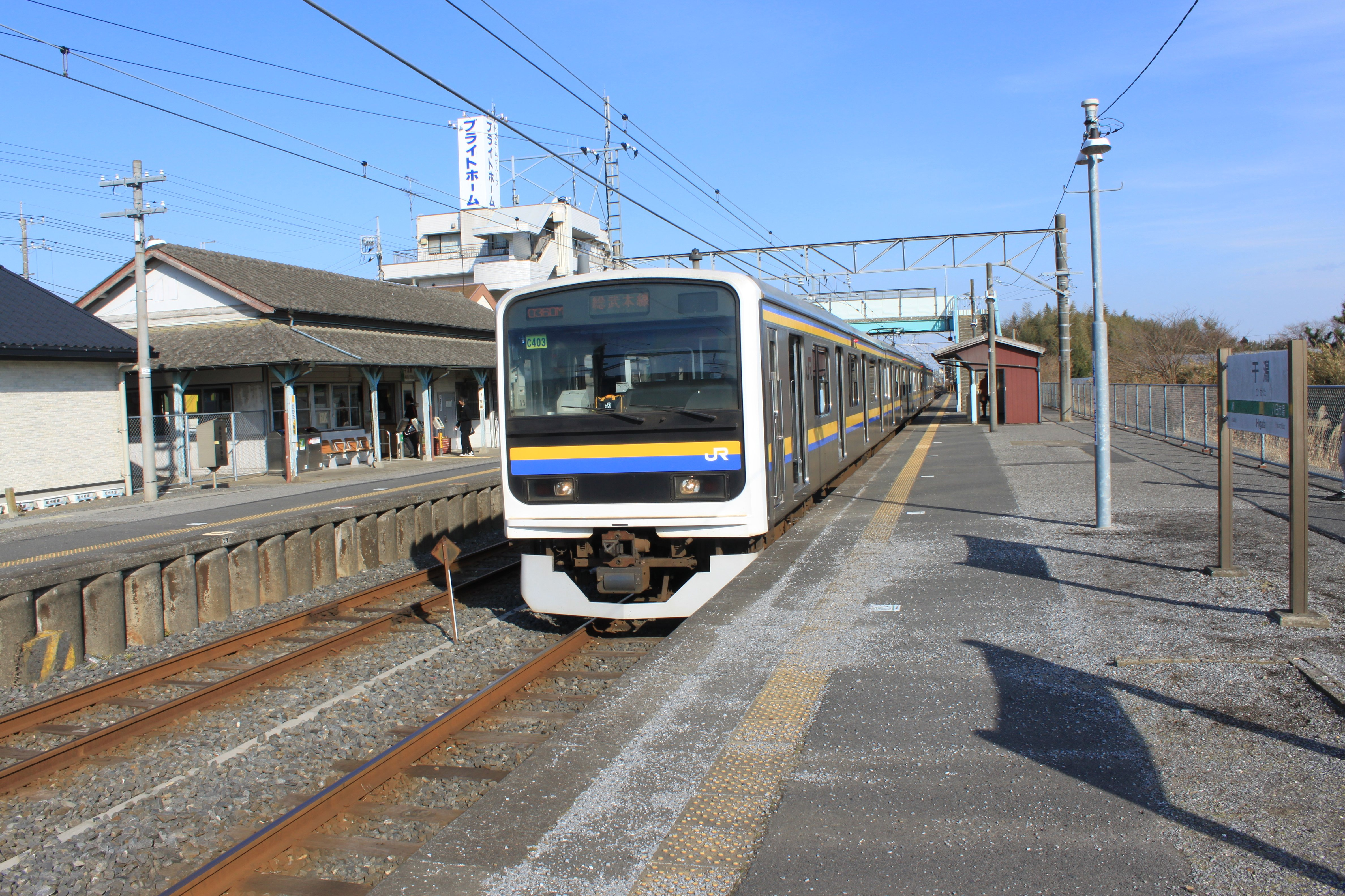 干潟駅